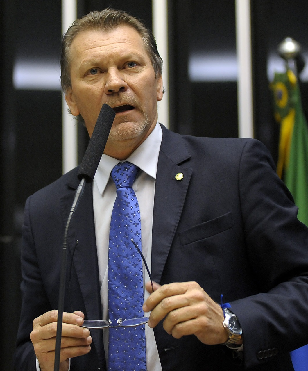 Afonso Hamm em julho de 2015.